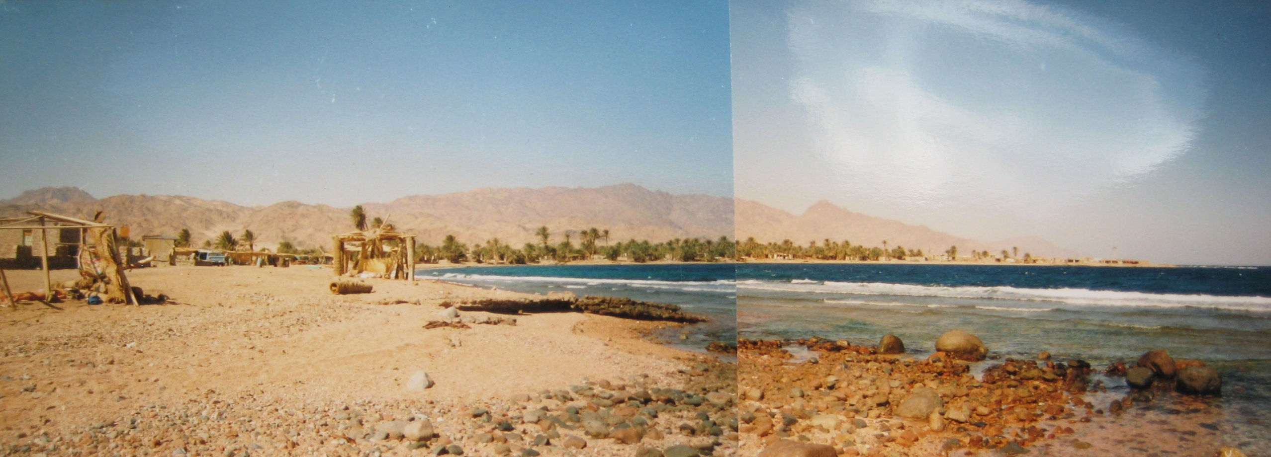 Dahab in 1989